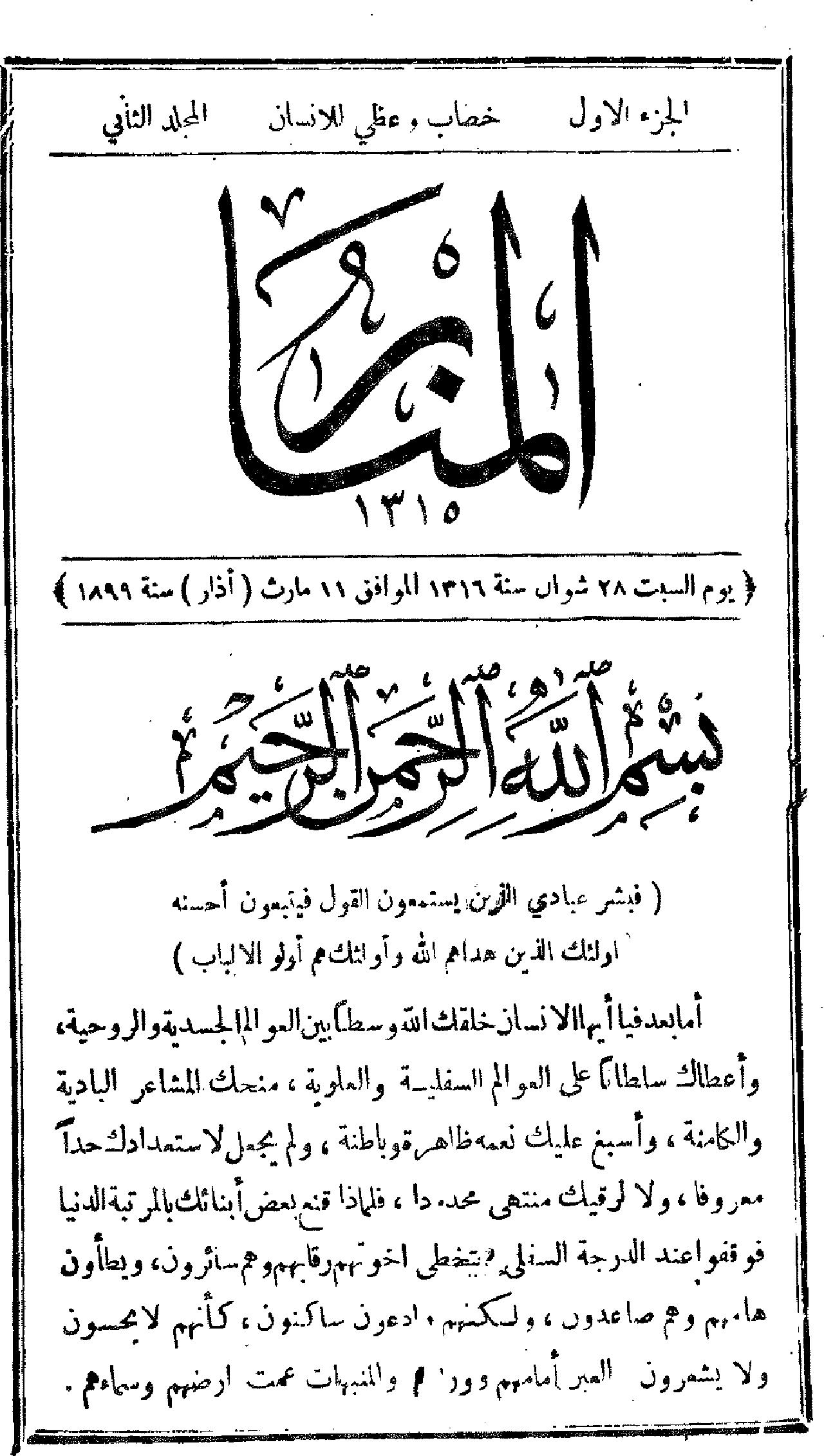 שער הגיליון השני של המגזין אל-מנאר, 1899